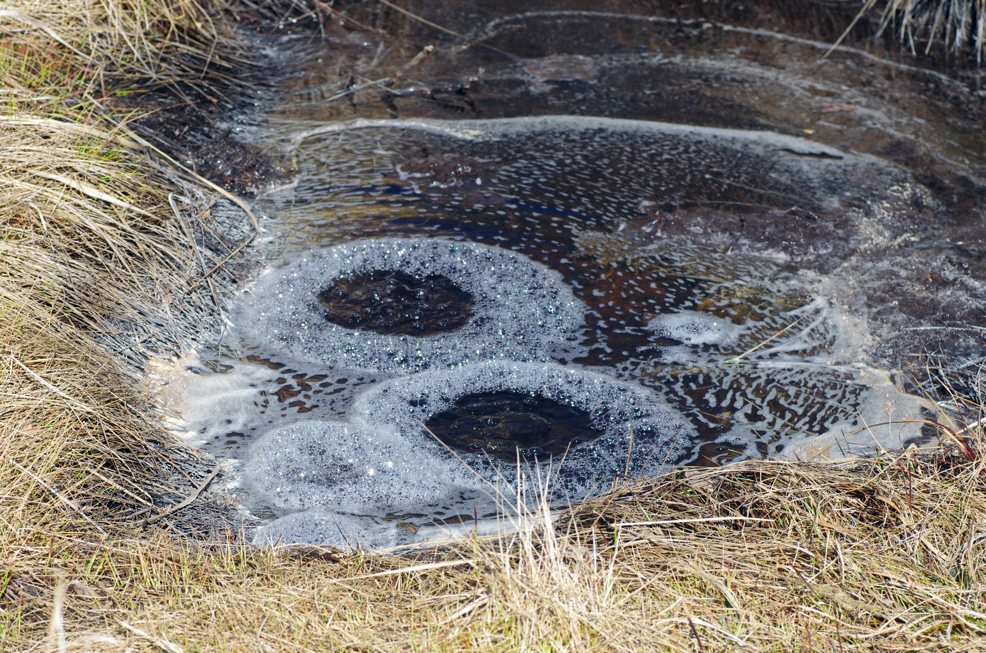 Přírodní památka Sirňák, okres Cheb